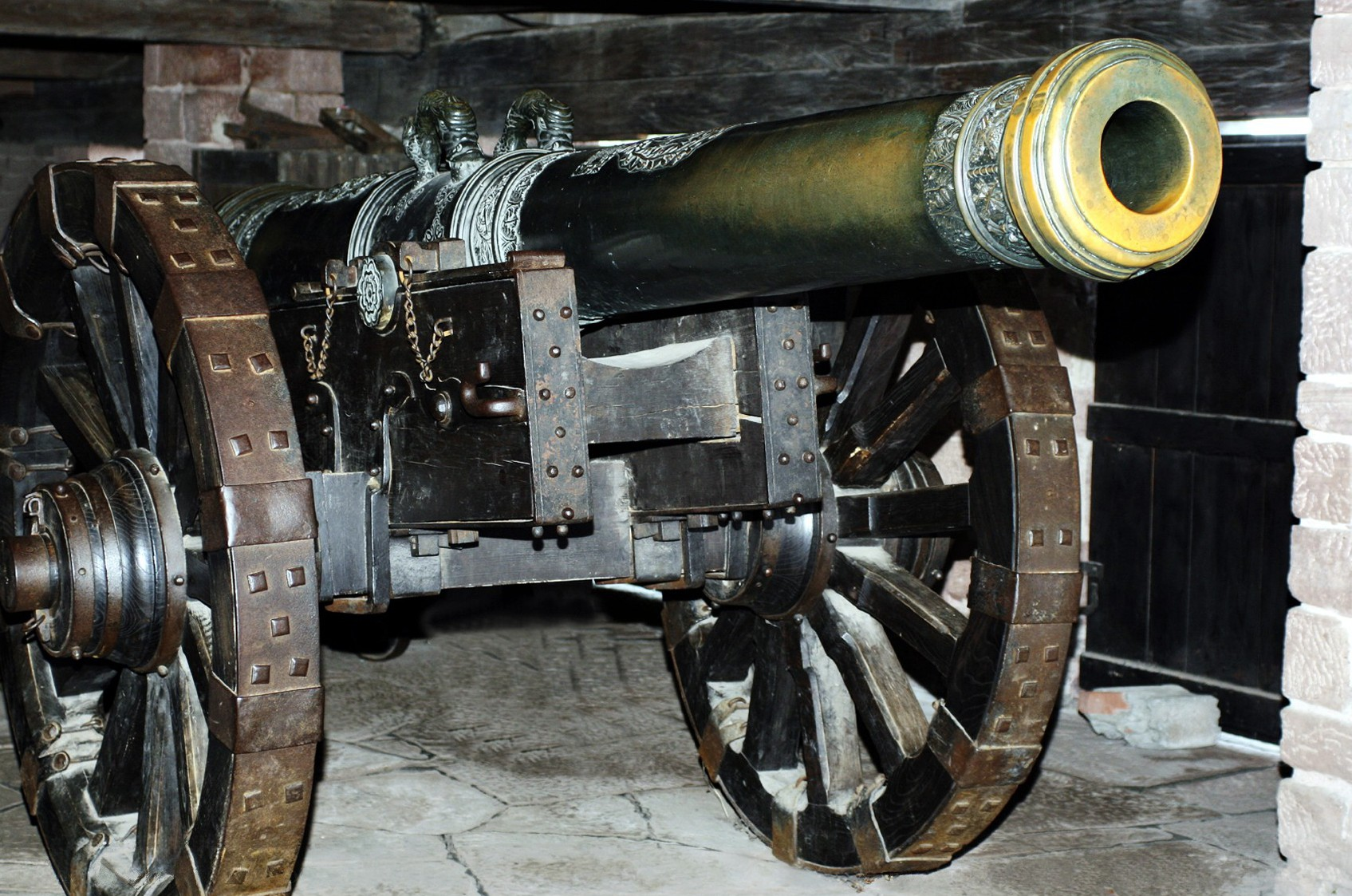 Cannone nel castello di Haut-Koenigsbourg